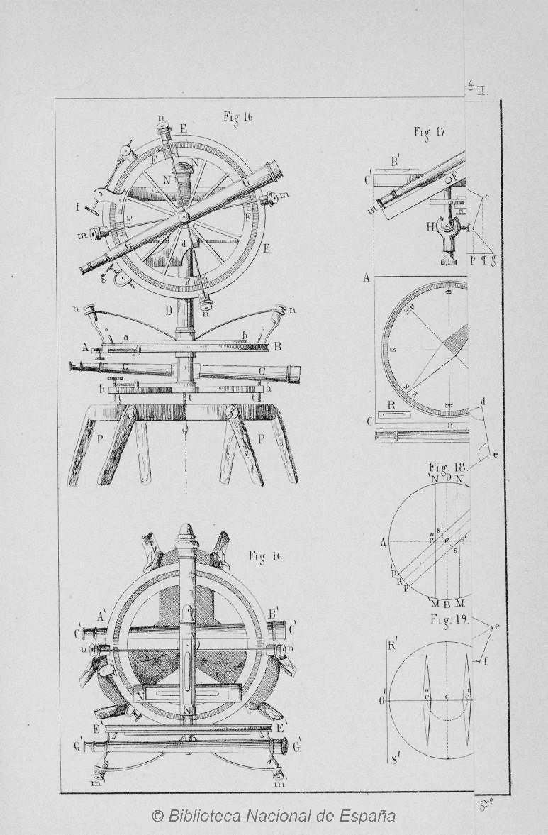 Curso elemental de topografía y agrimensura por Demetrio de los Ríos y Serrano Autor: Ríos, Demetrio de los (1827-1892) Fecha: 1862 Datos de edición: [S.l.] [s.n.] Sevilla Imp. Española y Extranjera